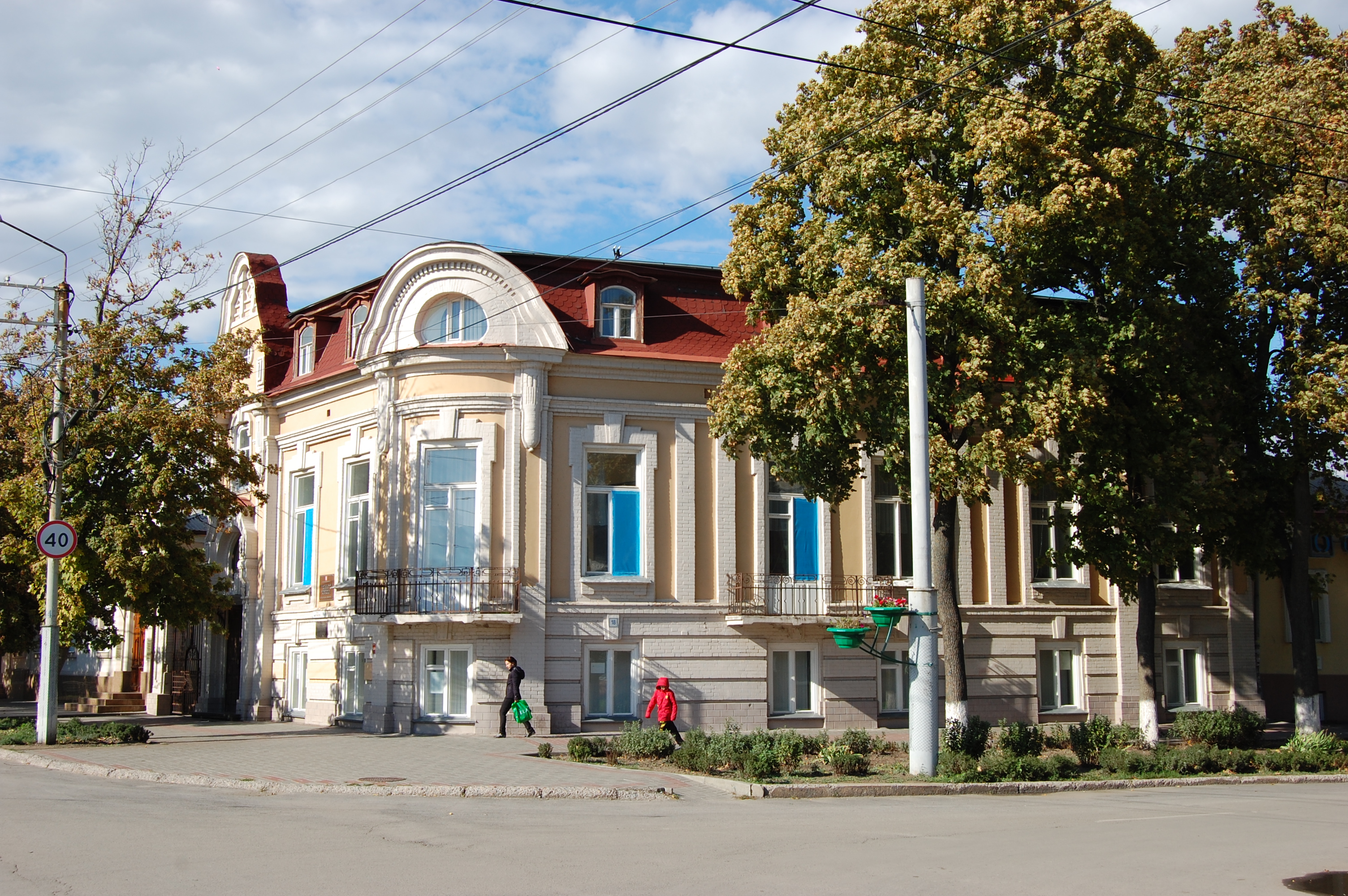 "Дом Тер-Арутюнова". Таганрог, ул. Фрунзе 16